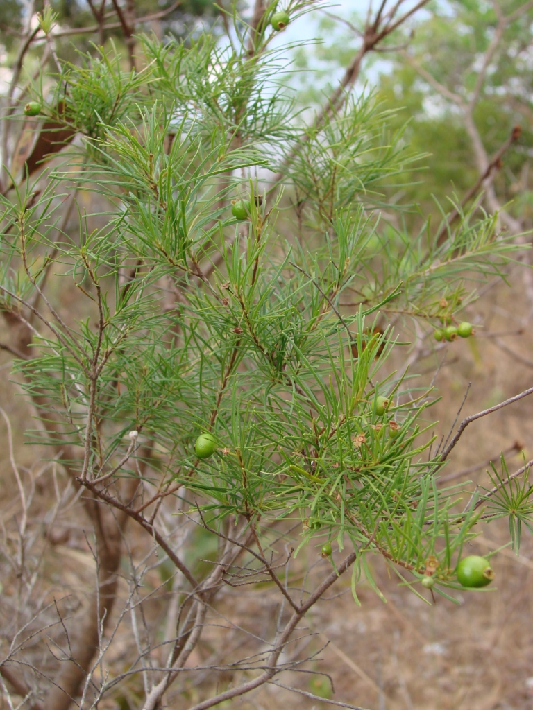 Eugenia angustissima O. Berg - MYRTACEAE - Parque Ecológico Dom Bosco - Brasília - Distrito Federal - Brasil.